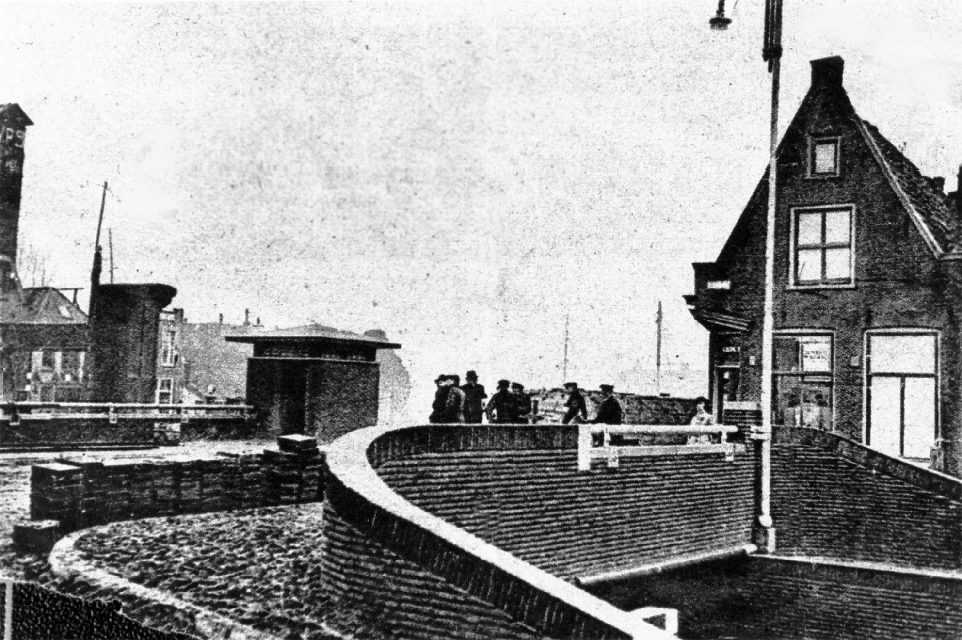 De Jousterpijp in 1900 (situatie onveranderd tot circa 1950).